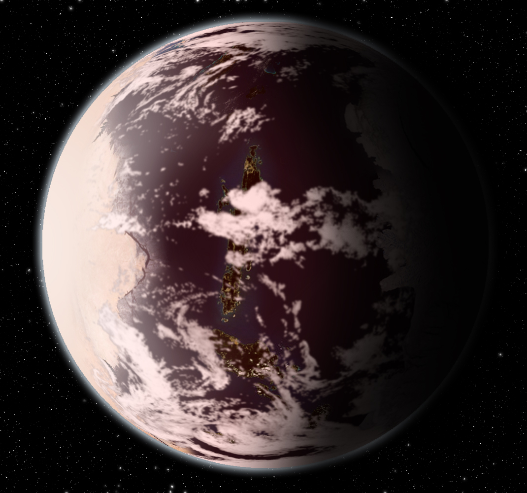 Impresión artística de un exoplaneta habitable que orbita alrededor de una enana roja